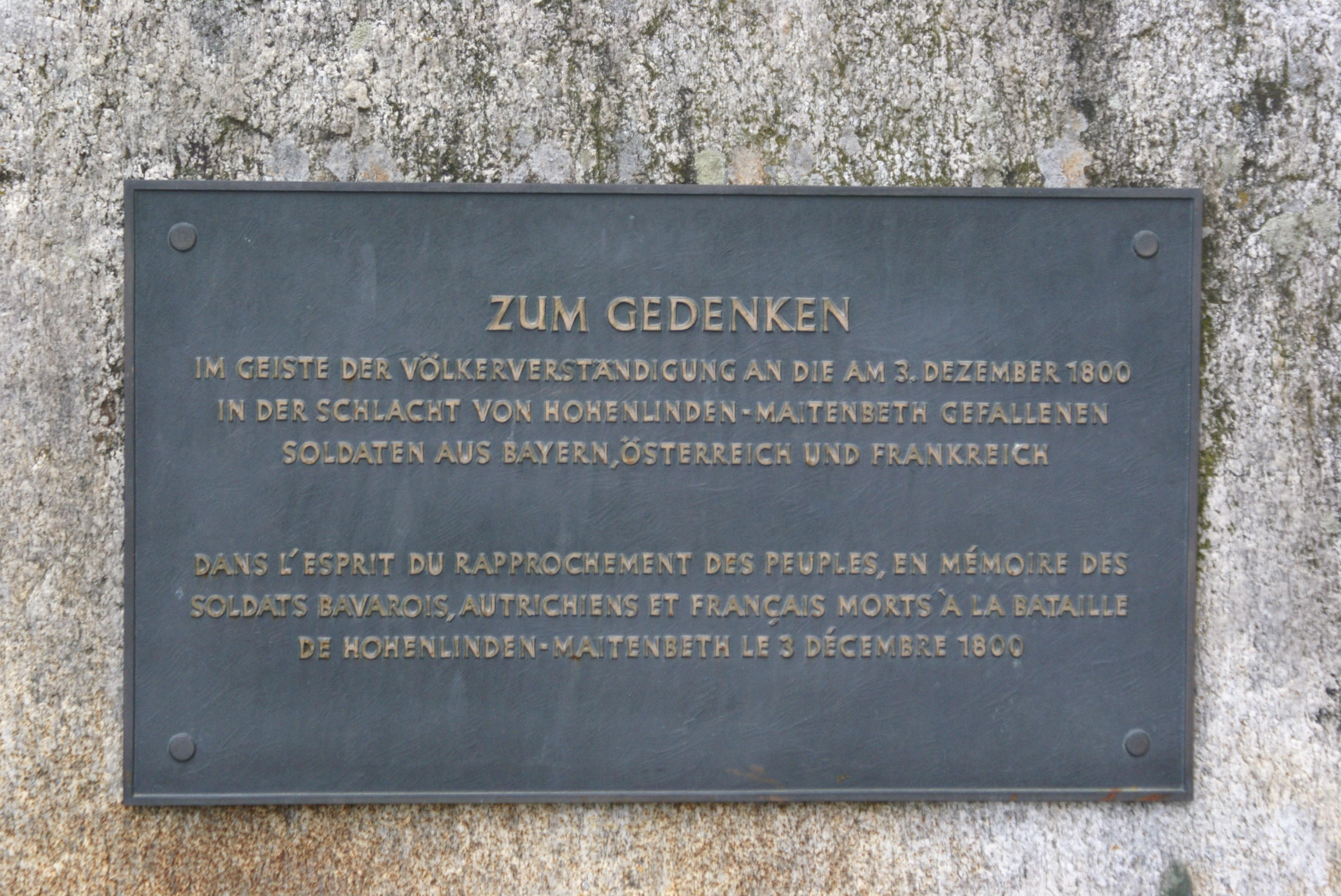 Gedenktafel an der Kirche von Maitenbeth zur Schlacht von Hohenlinden am 03.12.1800